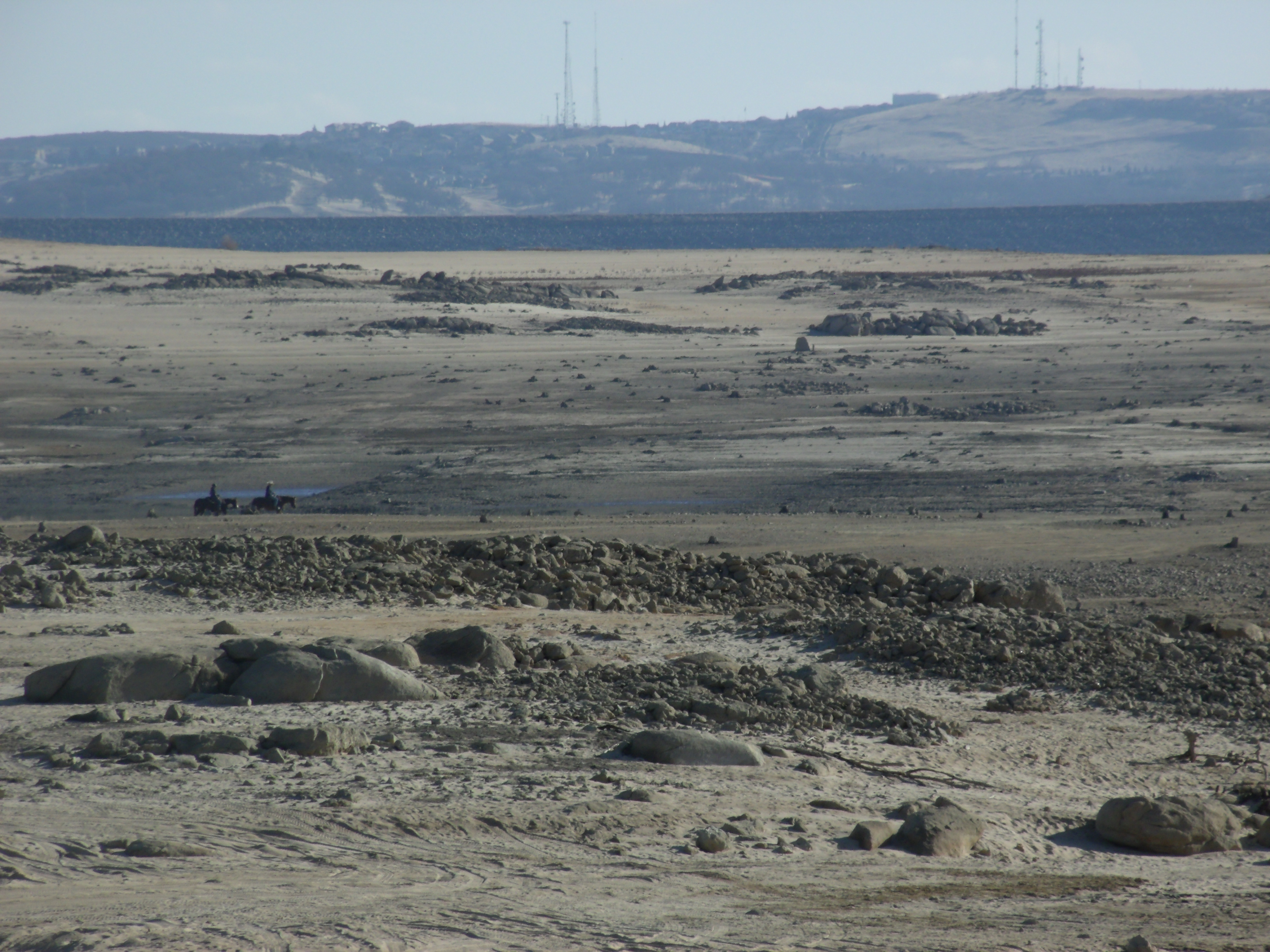 Folsom Lake Low Level 1-9-14